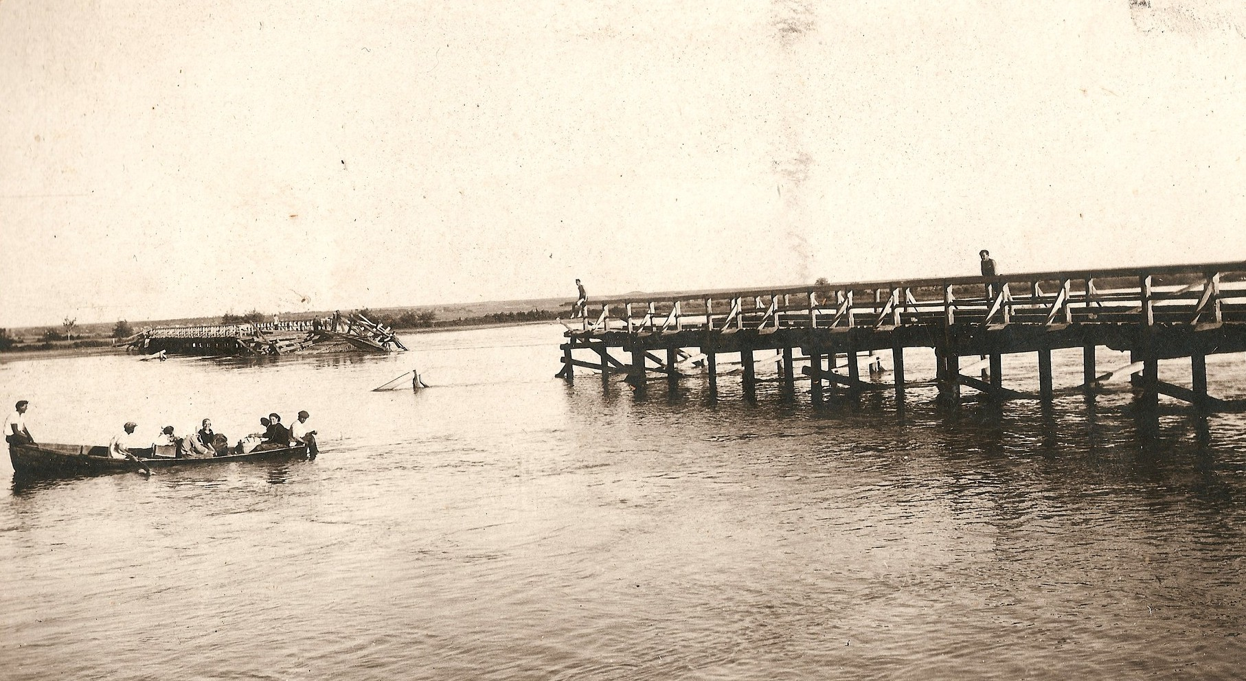 из фотоальбоа Н. Пемова